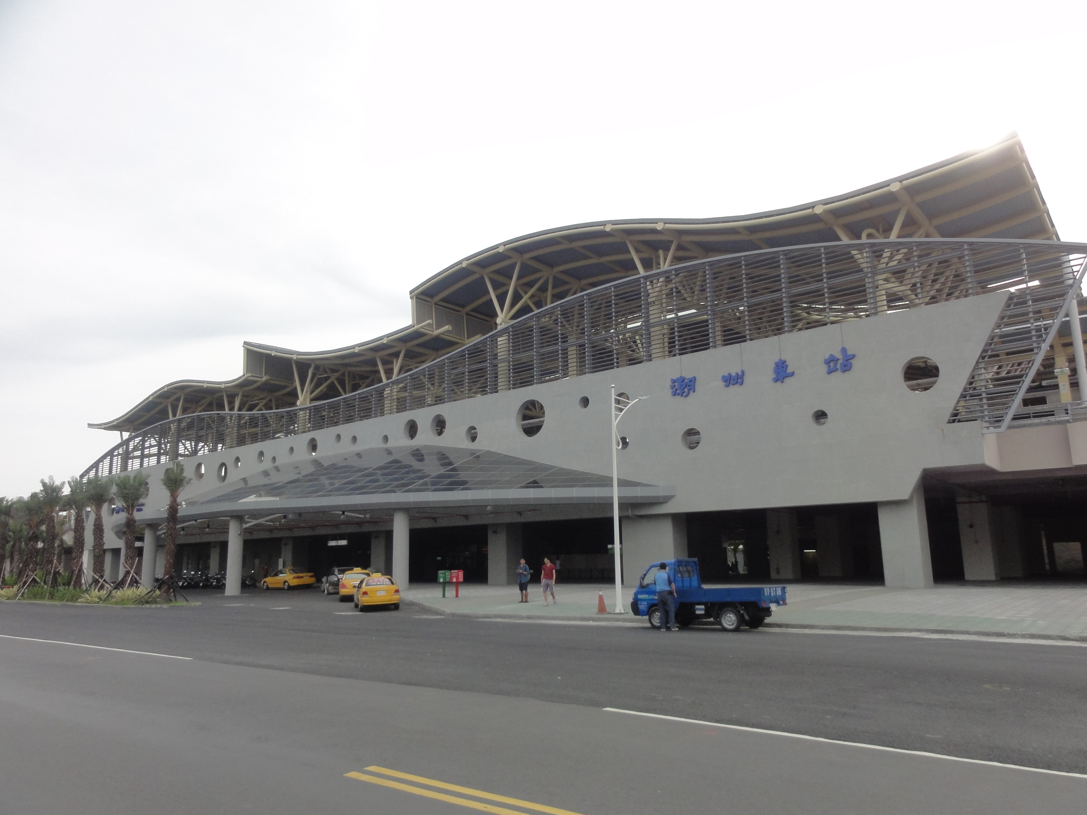 潮州車站